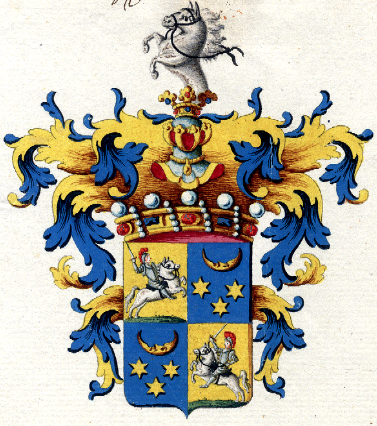 Wappen derer von Cavallar